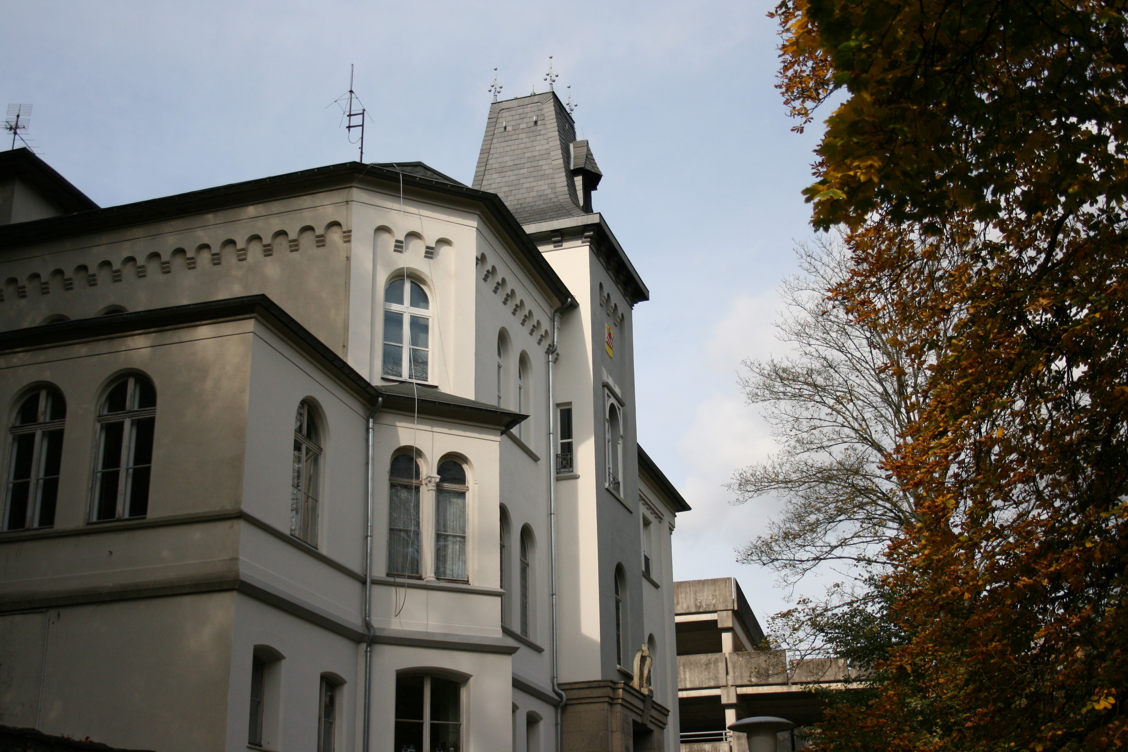 Rathaus in Altena